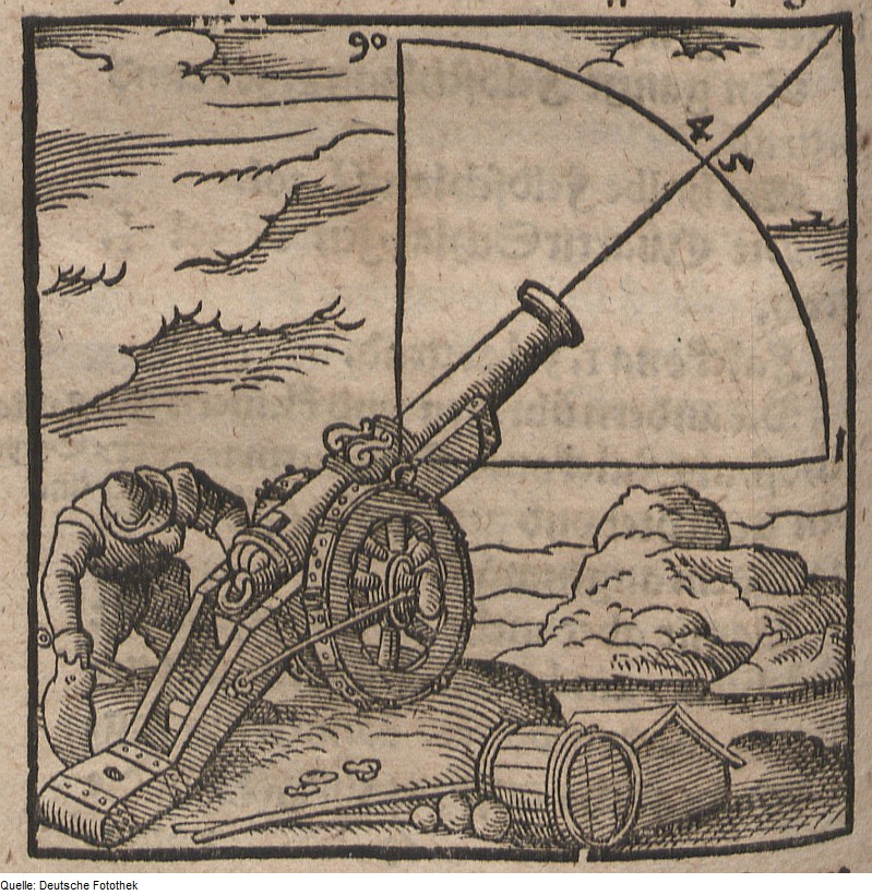 Original image description from the Deutsche Fotothek Waffenkunde & Kanone